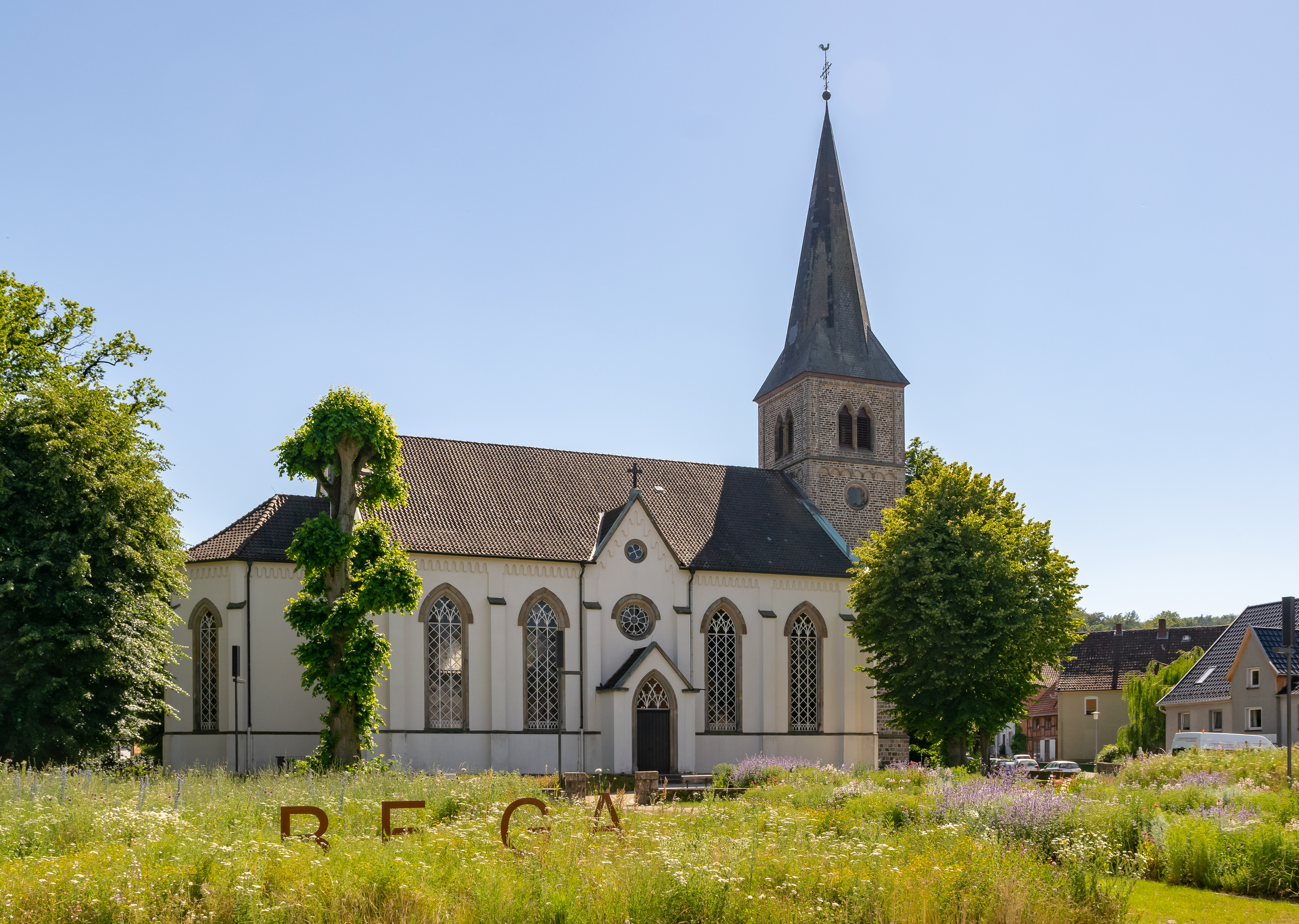 Evangelisch-reformierte Kirche in Dörentrup-Bega, Nordseite